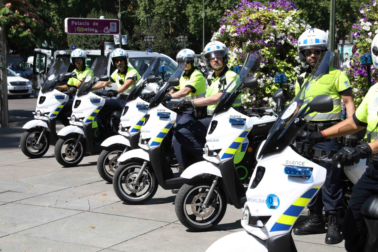 Los agentes de movilidad cuentan a partir de ahora con 13 scooters eléctricos para desplazarse por las calles de la ciudad en los servicios de vigilancia de la circulación. Con la incorporación de estas motos, el Ayuntamiento de Madrid da un paso más en la renovación de su flota municipal con vehículos poco o nada contaminantes, en línea con el Plan A de Calidad del Aire y Cambio Climático. La delegada de Medio Ambiente y Movilidad, Inés Sabanés, ha presentado hoy, 23 de junio, los nuevos vehículos.